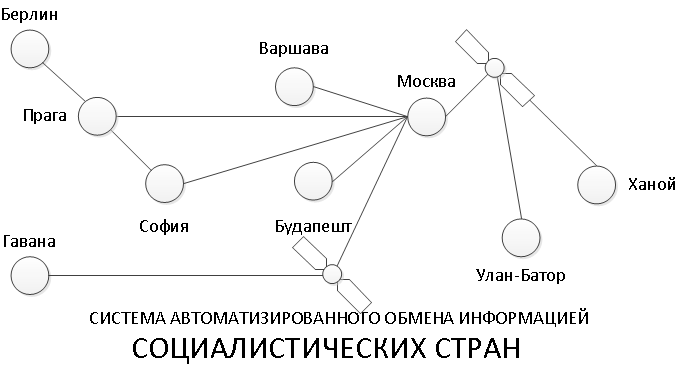 СССР, 1985 г.